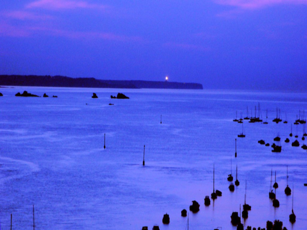 Le feu du phare du Cap Fréhel vu depuis Saint-Briac